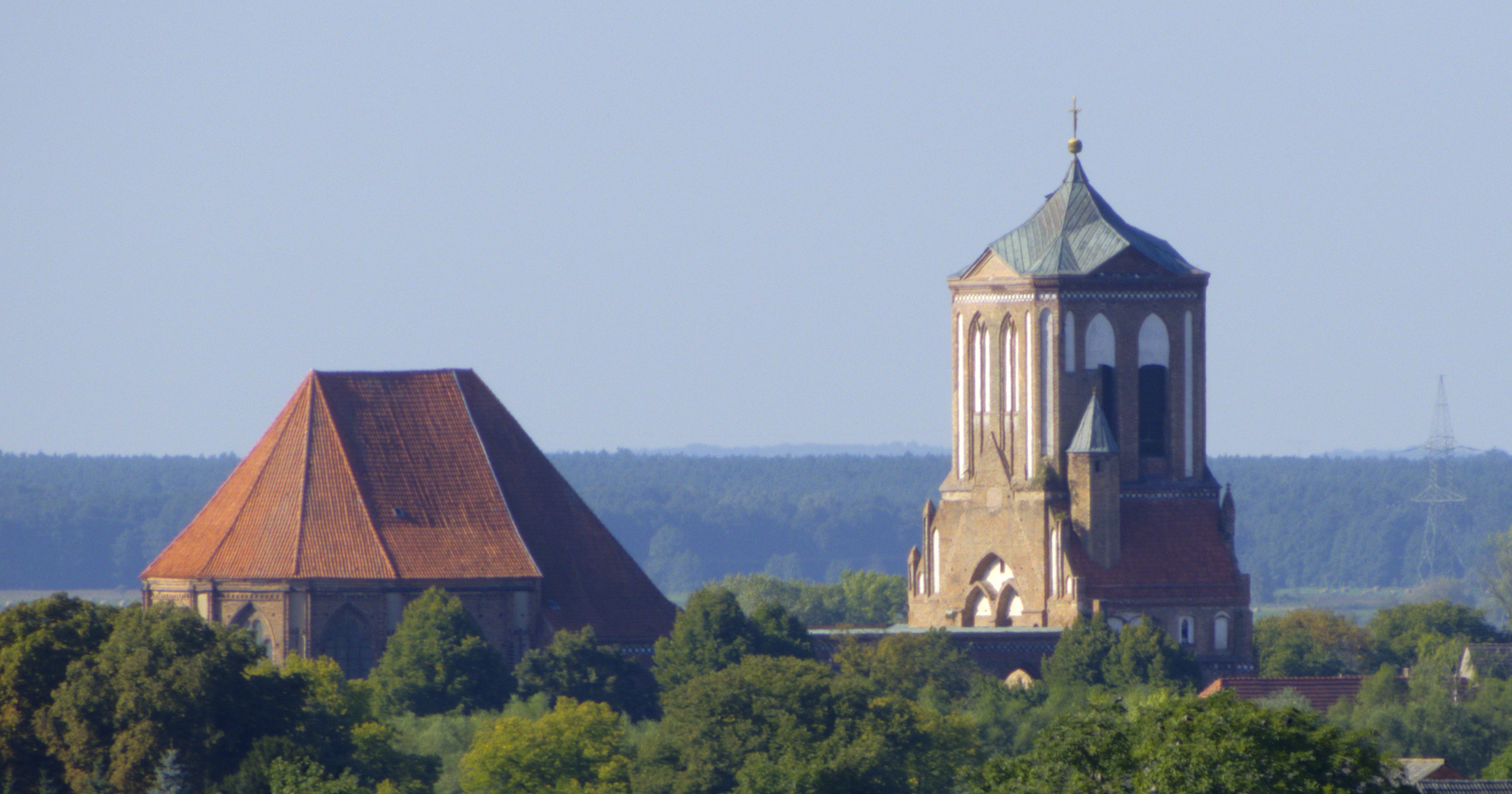 Kirche Gartz